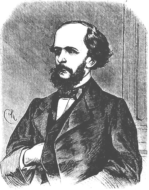 Roger Maurycy Raczyński 1819? 1820-1864